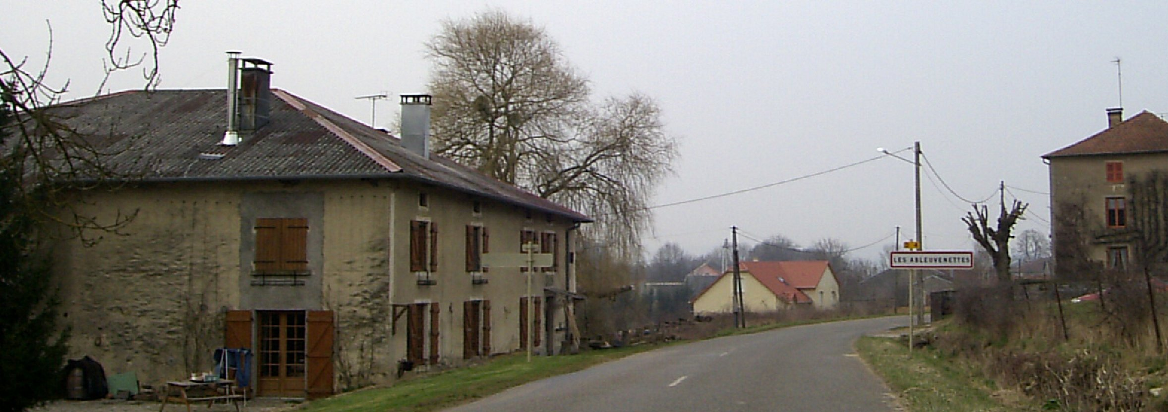 Les Ableuvenettes